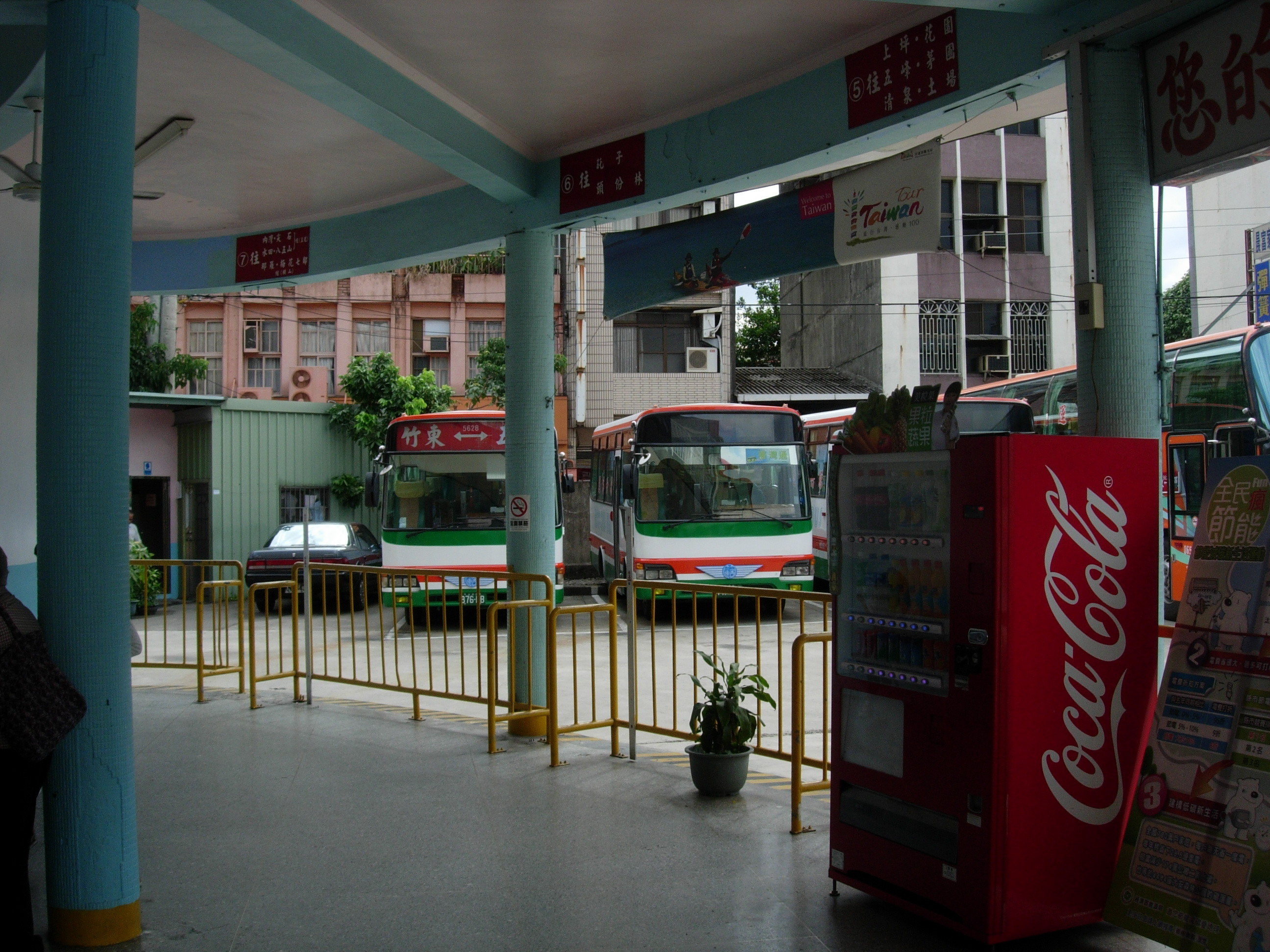 中文（台灣）: 新竹客運竹東站月台2